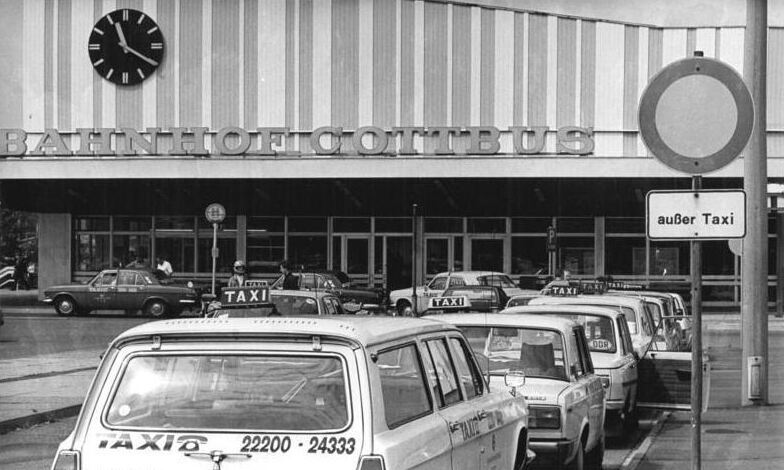 Cottbus, Bahnhof, Taxis ADN Rainer Weißflog 5.7.90-Cottbus : Verkehr-Offenbar wiegt für viele Bürger die neue Währung noch zu schwer, um sie für eine Taxifahrt locker zu machen. Wie hier vor dem Cottbusser Bahnhof stellten sich die Taxis nach den Kunden an.